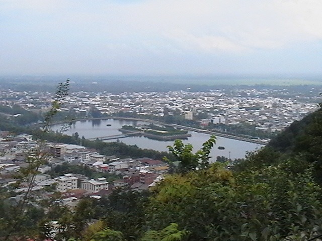 لاهیجان